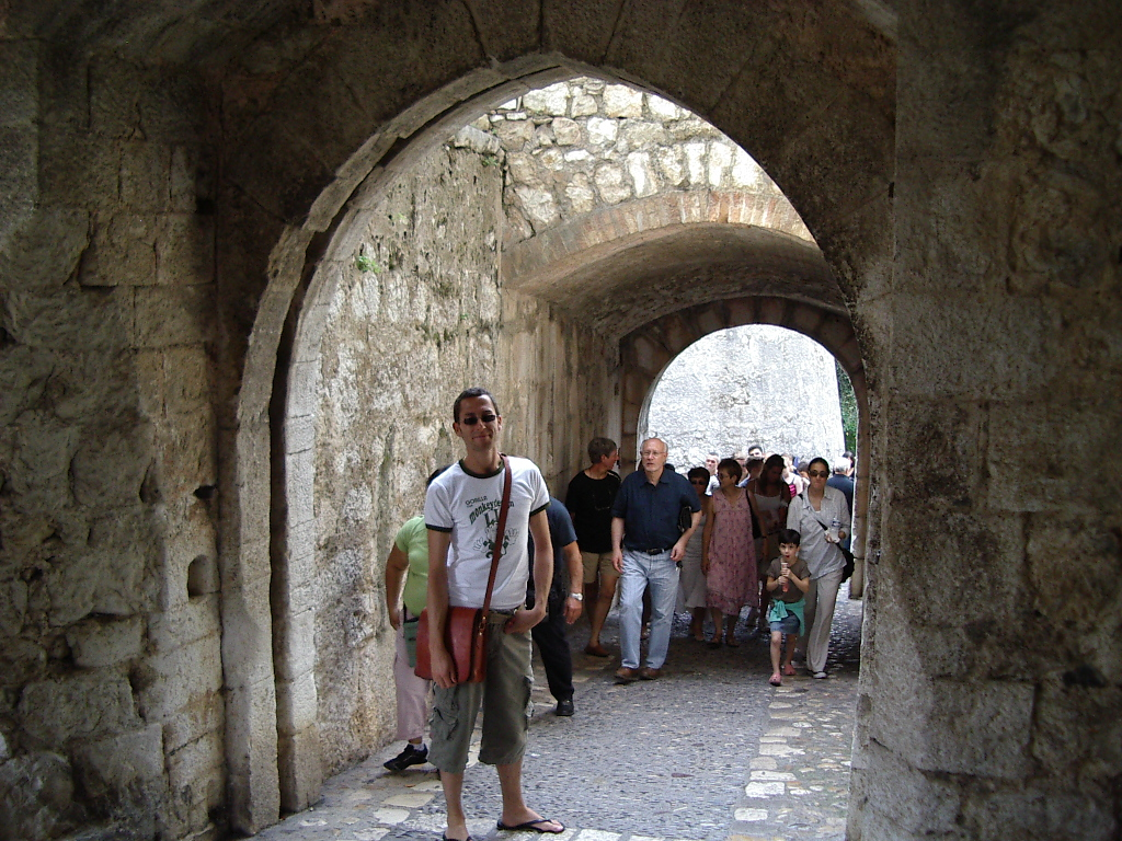 Saint Paul Alpes Maritimes